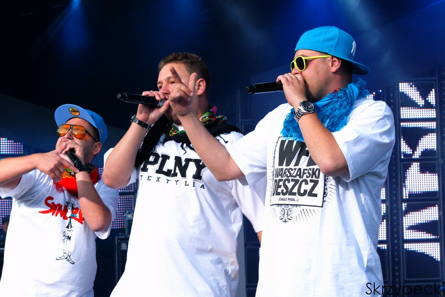 Tede @ 46. KFPP in Opole.